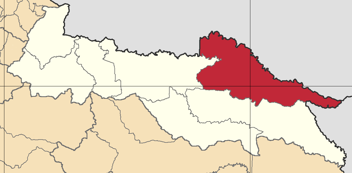 Mapa localizacor del cantón Putumayo, Sucumbíos, Ecuador